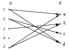 Відповідність між множинами, зображена з допомогою графа